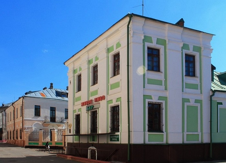 Правы флігель Архірэйскага падворка